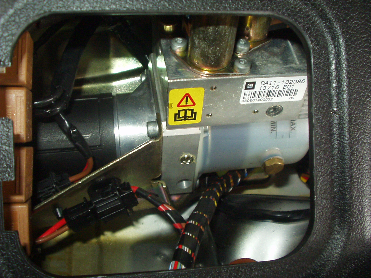 Hydropneumatische Einheit, welche das Stoffdach öffnet und schließt